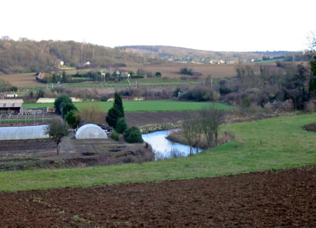 La Mauldre à La Falaise Photo JH Mora 02/01/2005